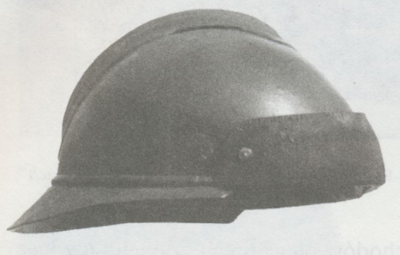 Hełm francuski wz. 15 przerobiony na hełm czołgowy na potrzeby Wojska Polskiego